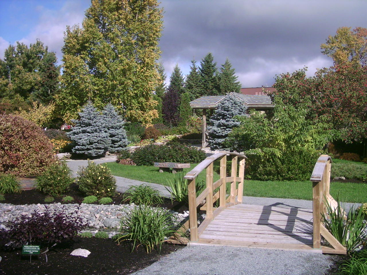 Parc à fleur d'eau à Rouyn-Noranda